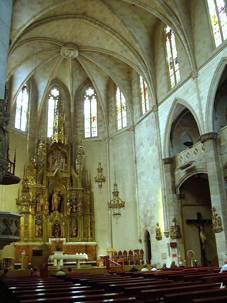 Església de Sant Ramon de Penyafort de Barcelona, a la Rambla de Catalunya, antiga església del Monestir de Montsió, al Portal de l'Àngel. Edifici del s. XIV traslladat a la ubicació actual al s. XX